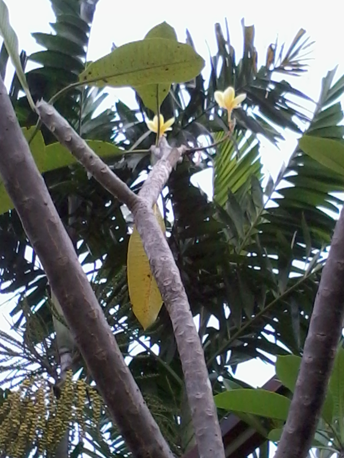 Bunga Kamboja putih dengan bagian dalam warna kuning merupakan Kamboja asli Indonesia